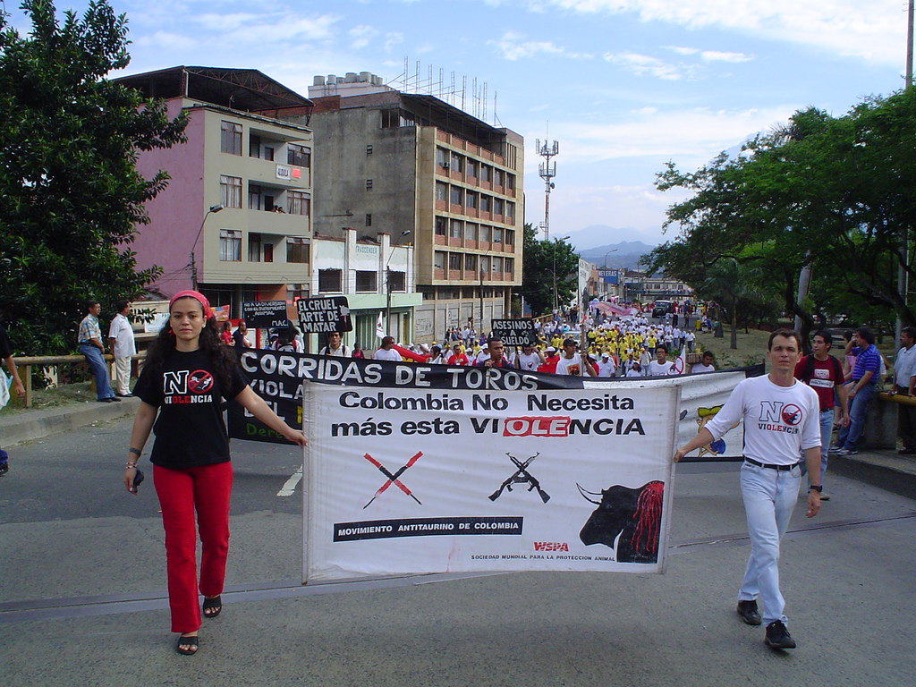 Marcha por la defensa de los animales por la Calle 5a